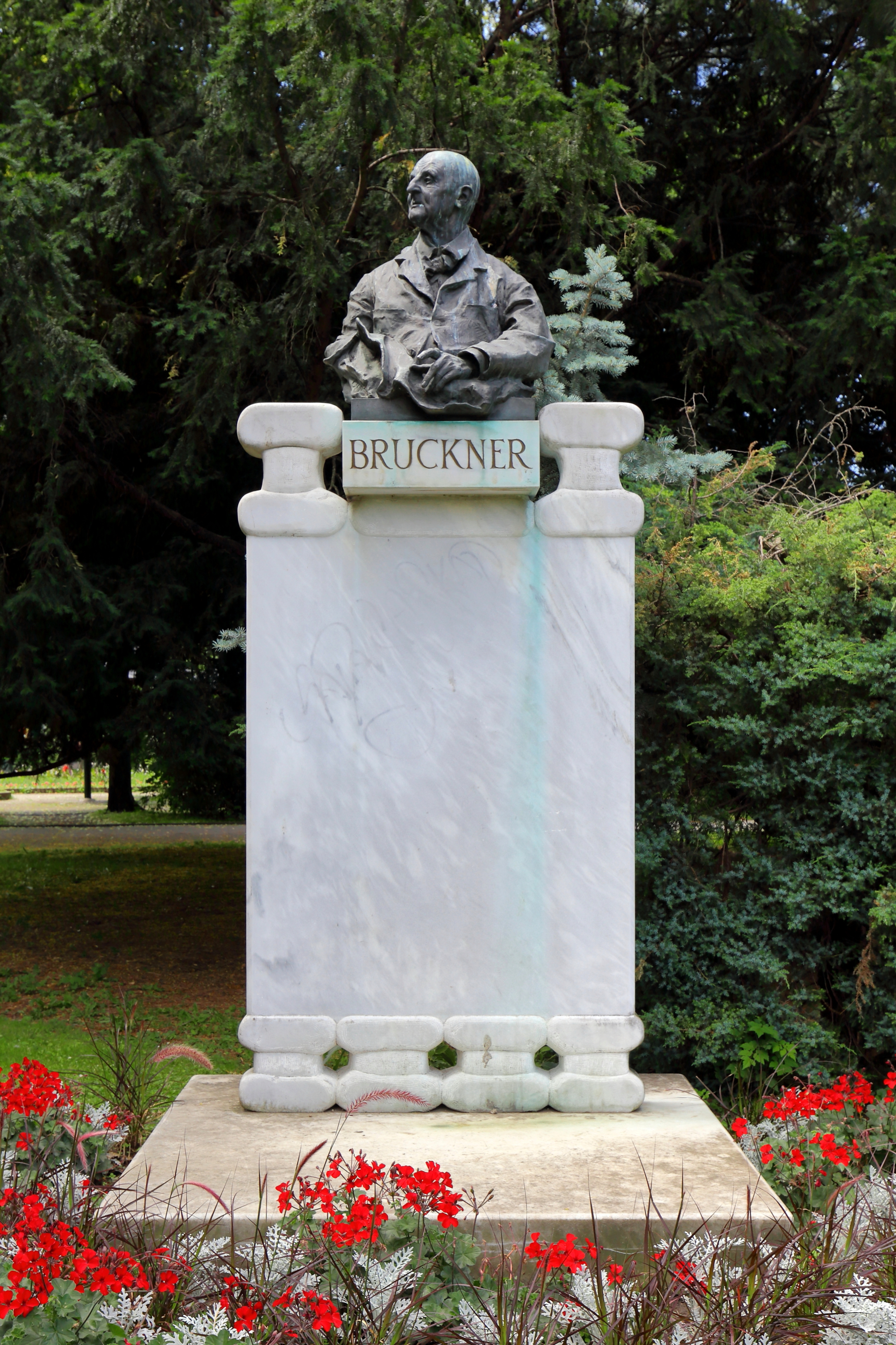 Das Anton-Bruckner-Denkmal im Stadtparkt im 1. Wiener Gemeindebezirk Innere Stadt.Im Stadtpark stand ursprünglich das originale Bruckner-Denkmal mit einer Bronzeporträtbüste von Viktor Tilgner und mit einem Sockel mit Muse der Tonkunst von Fritz Zerritsch dem Älteren (Enthüllung am 25. Oktober 1899). Nach mehrfacher Beschädigung durch Vandalen wurde es restauriert und im Innenhof der Alten Universität aufgestellt. Als Ersatz für das Originaldenkmal im Stadtpark schuf Stefan Kameyeczky einen Marmorsockel auf dem sich eine Kopie der Originalbüste befindet.